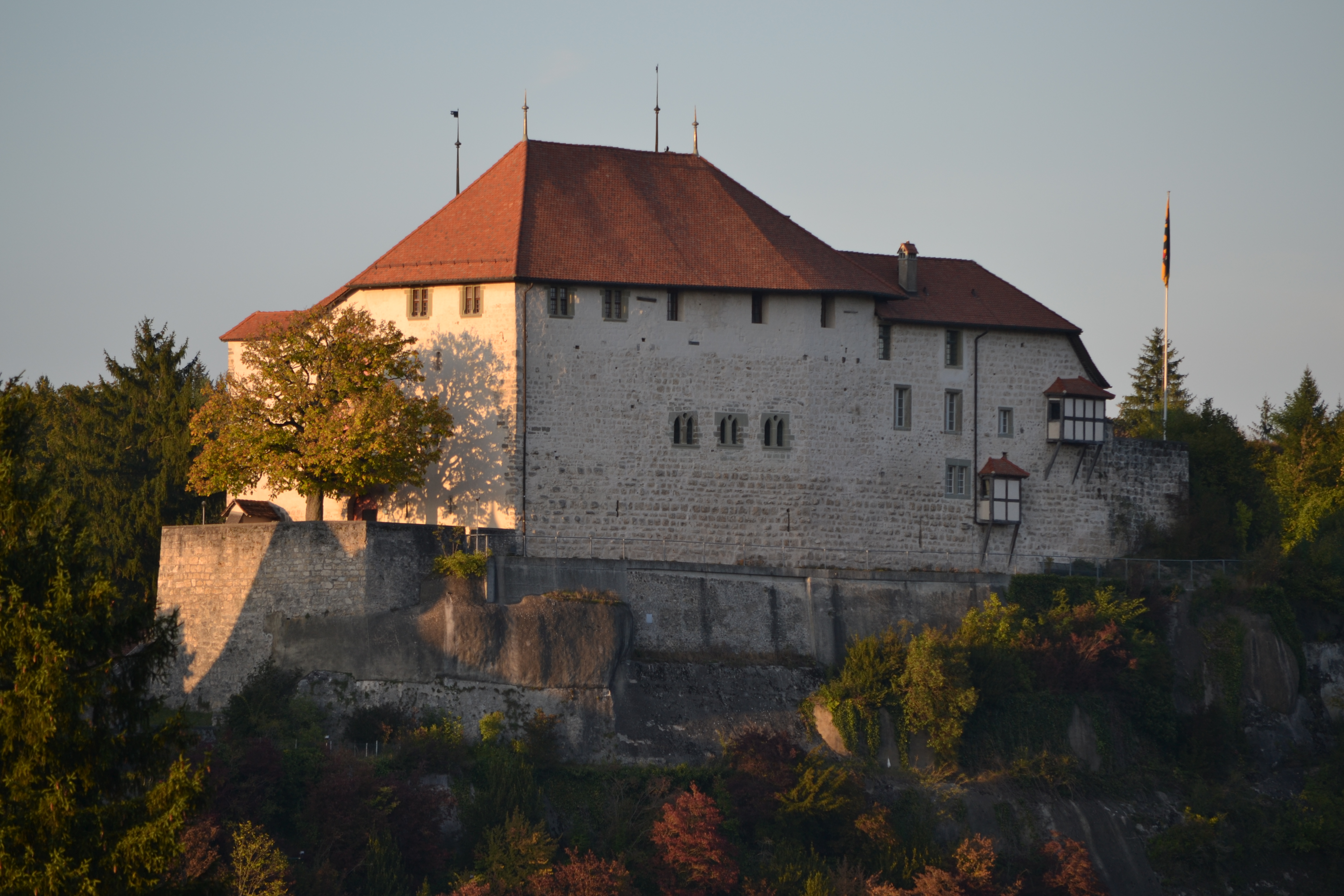 Sicht auf das Schloss Laupen